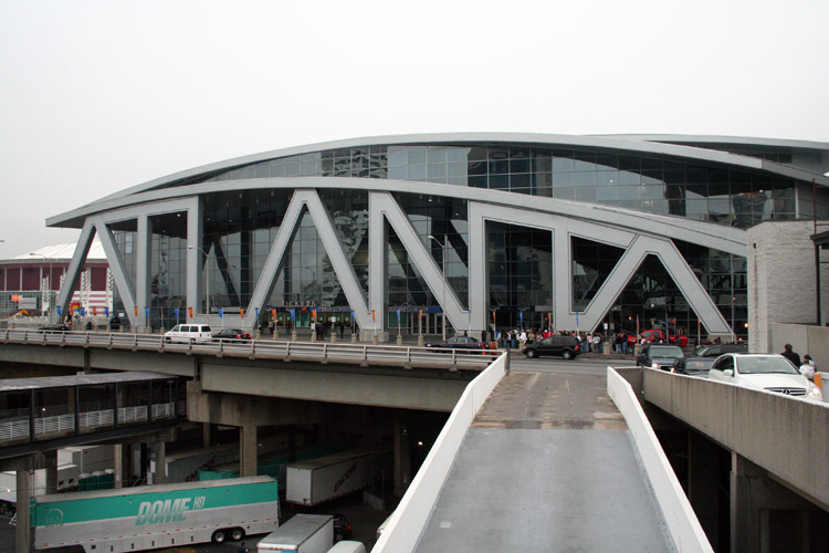 Philips Arena à Atlanta, GA. Image perso prise sur